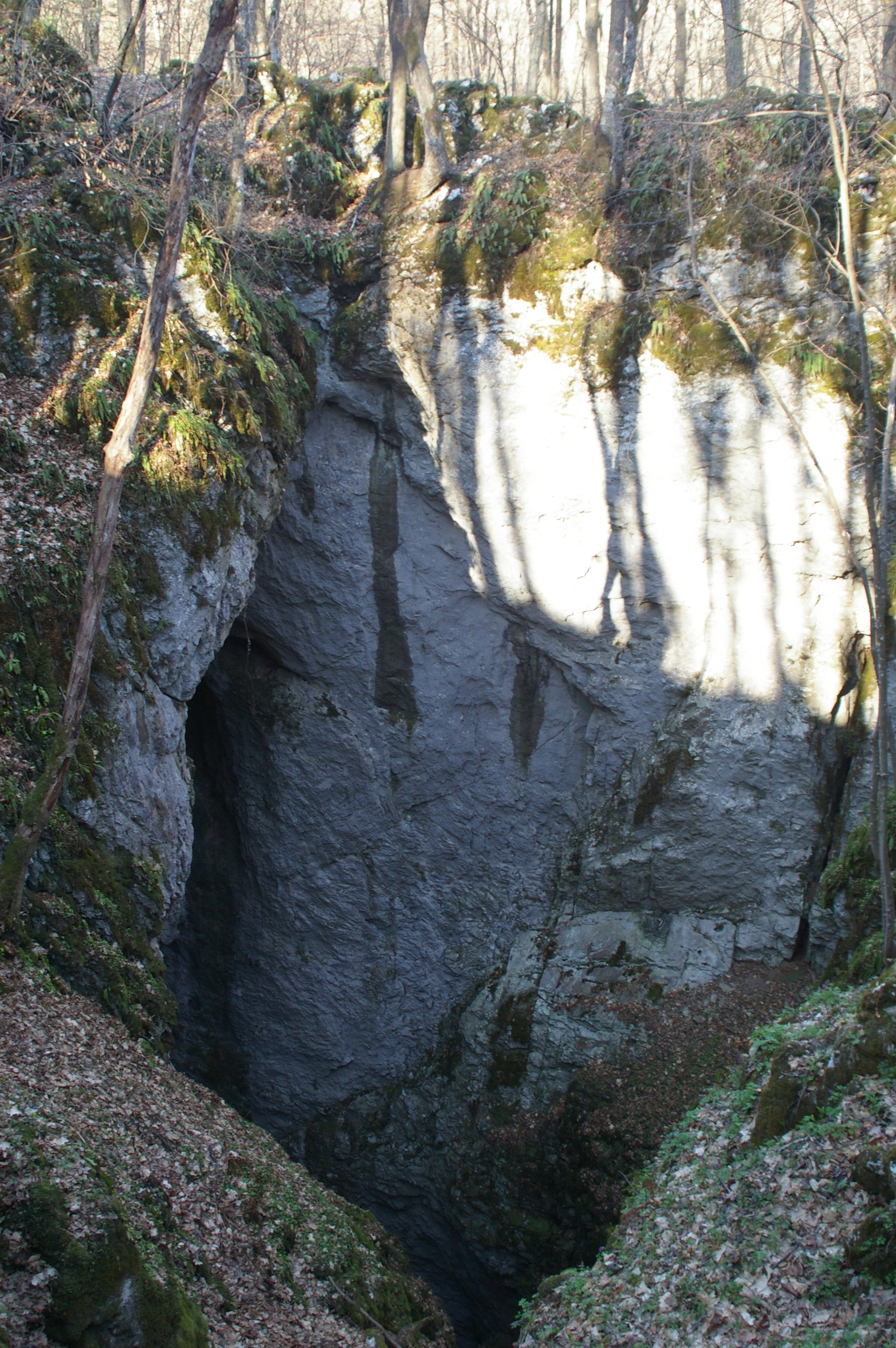 propast Bezedná ledniceSlovenčina: priepasť Bezodná ľadnica